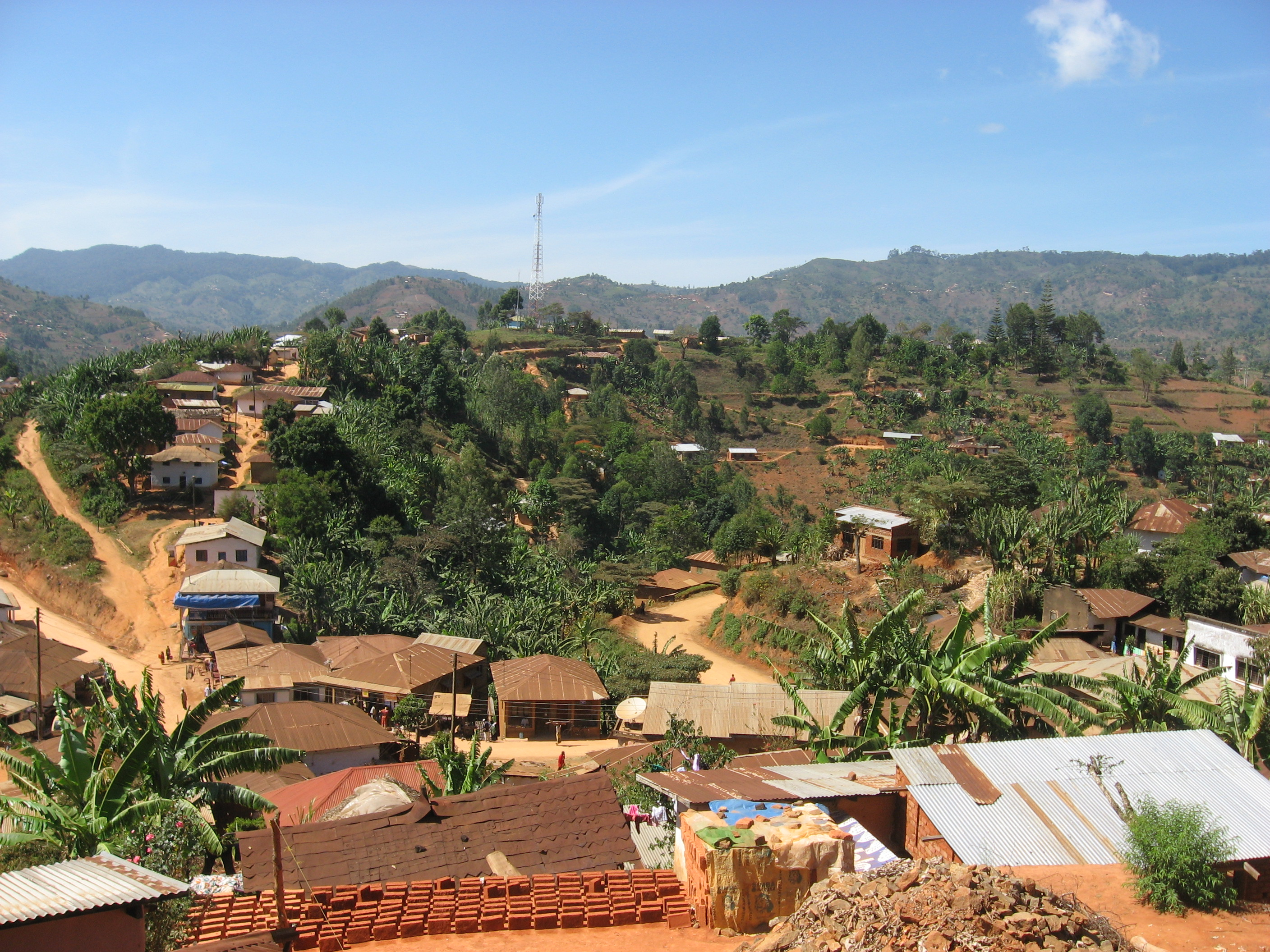 Kiswahili: Hii ni sehemu ya mji wa Bumbuli.